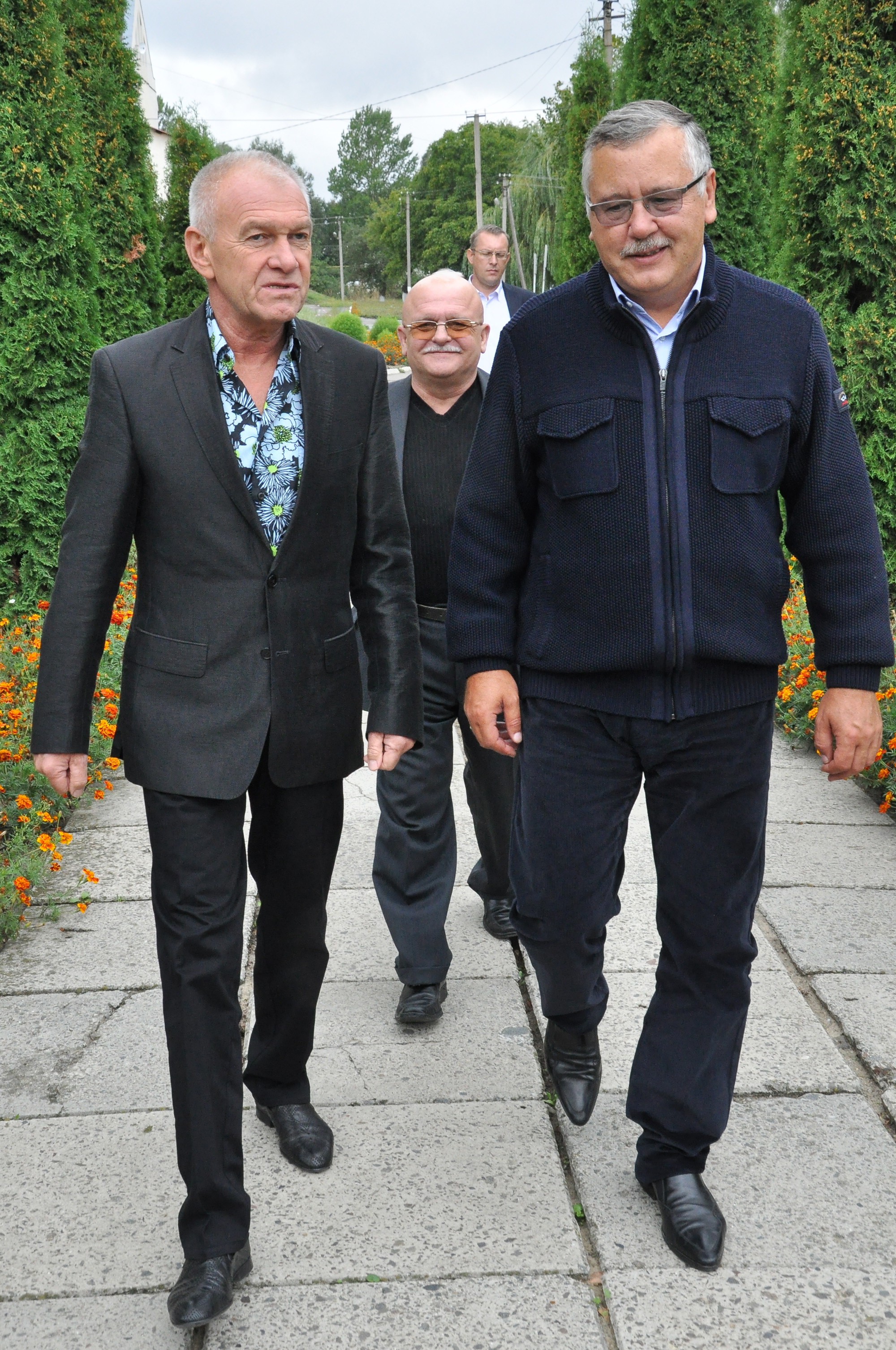 Візит Анатолія Гриценка до Тернопільської обласної комунальної клінічної психоневрологічної лікарні. Володимир Шкробот і Анатолій Гриценко.